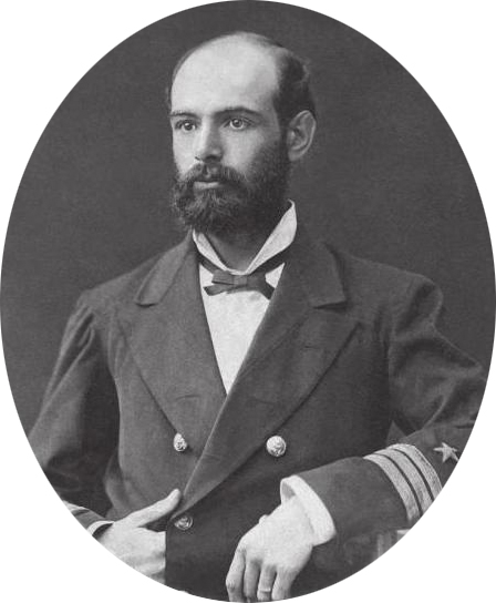 Fotografía de Arturo Prat Chacón